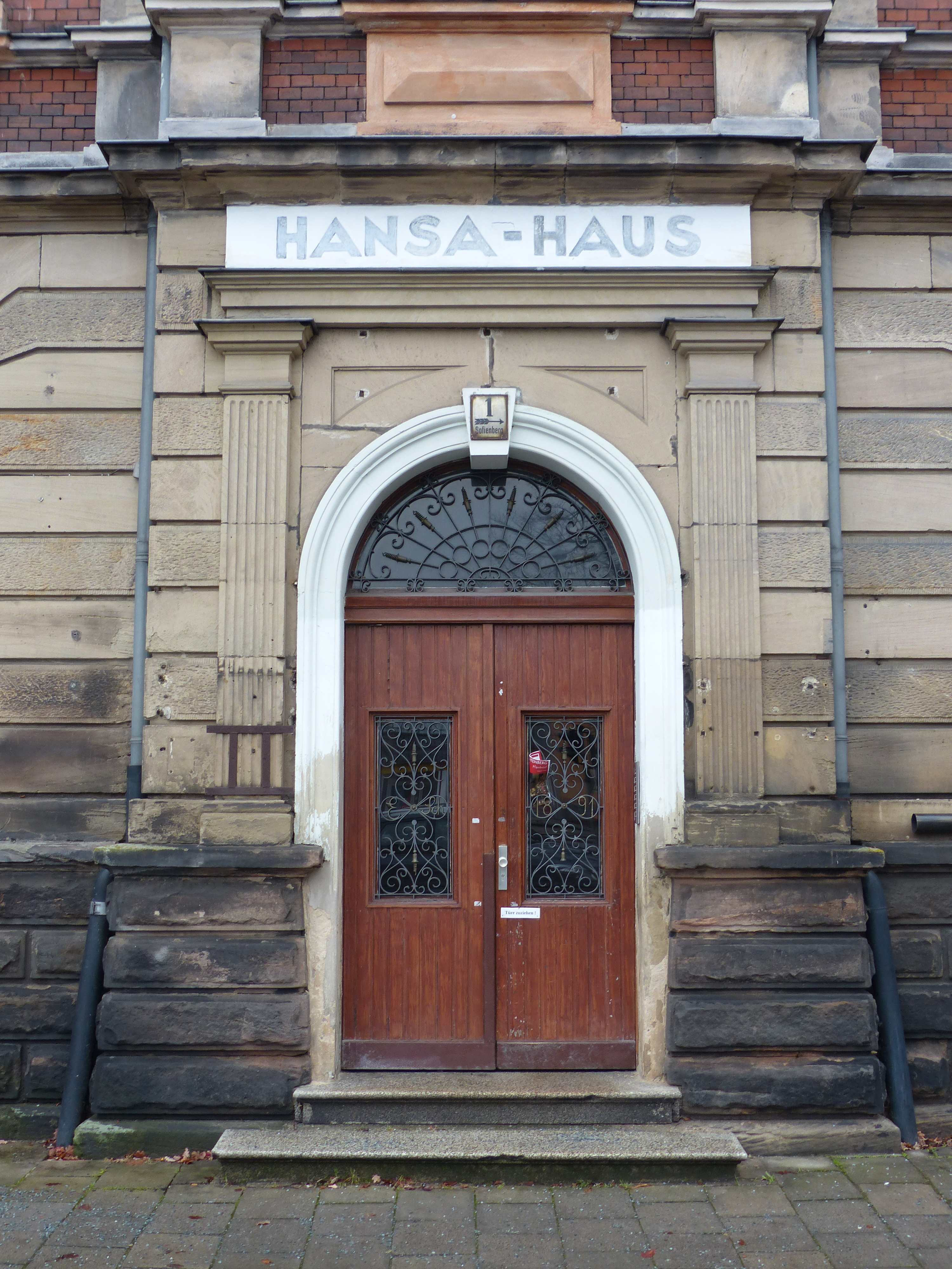 Hansa Haus in Hof, Sophienberg 1